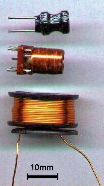 Photo einiger Spulen, aufgenommen von Honina 16:13, 7. Okt 2003 (CEST)